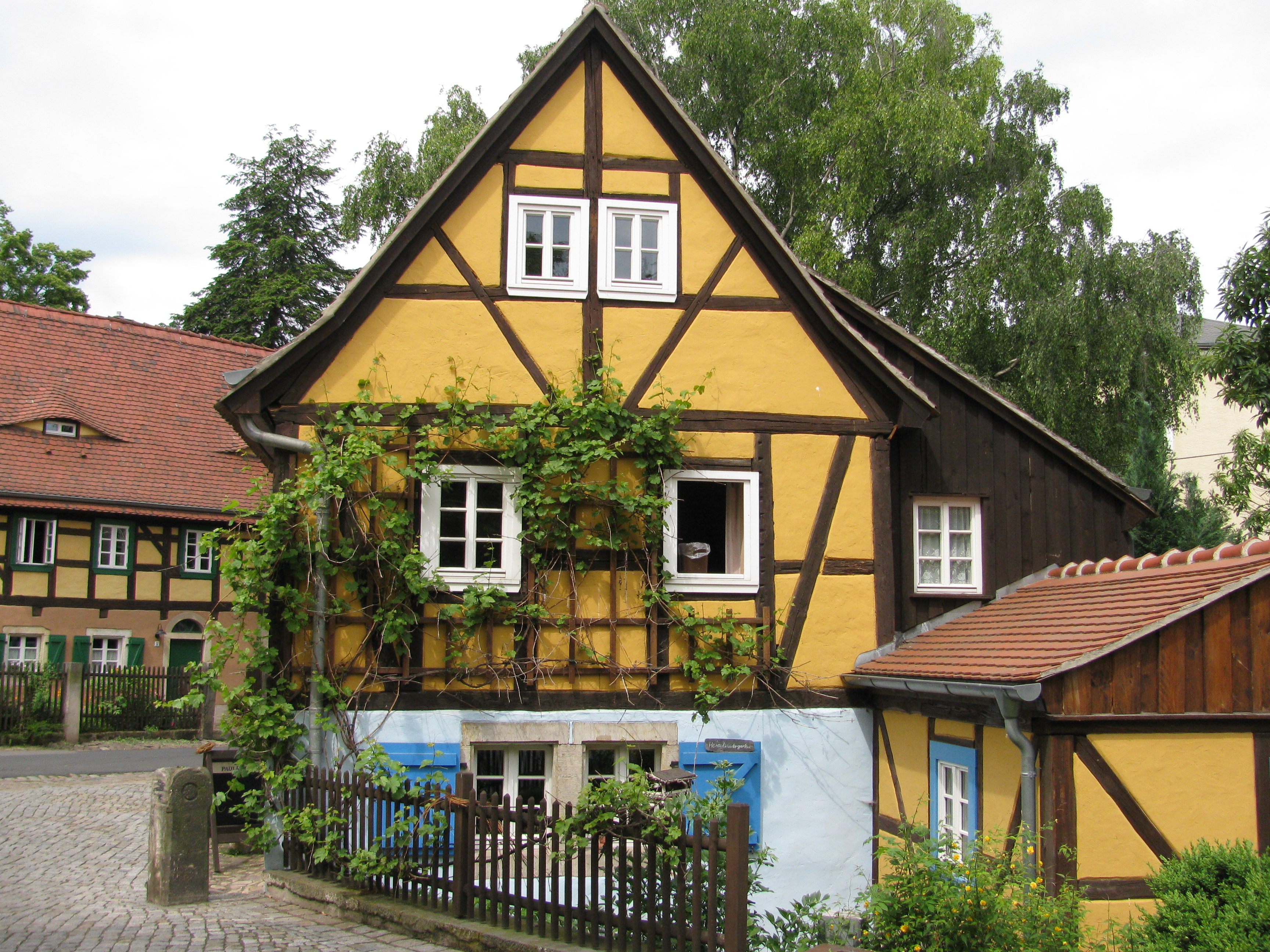 Gebäude (sog. Hexenhaus) im Dorfkern von Gorbitz, Stadtteil von Dresden